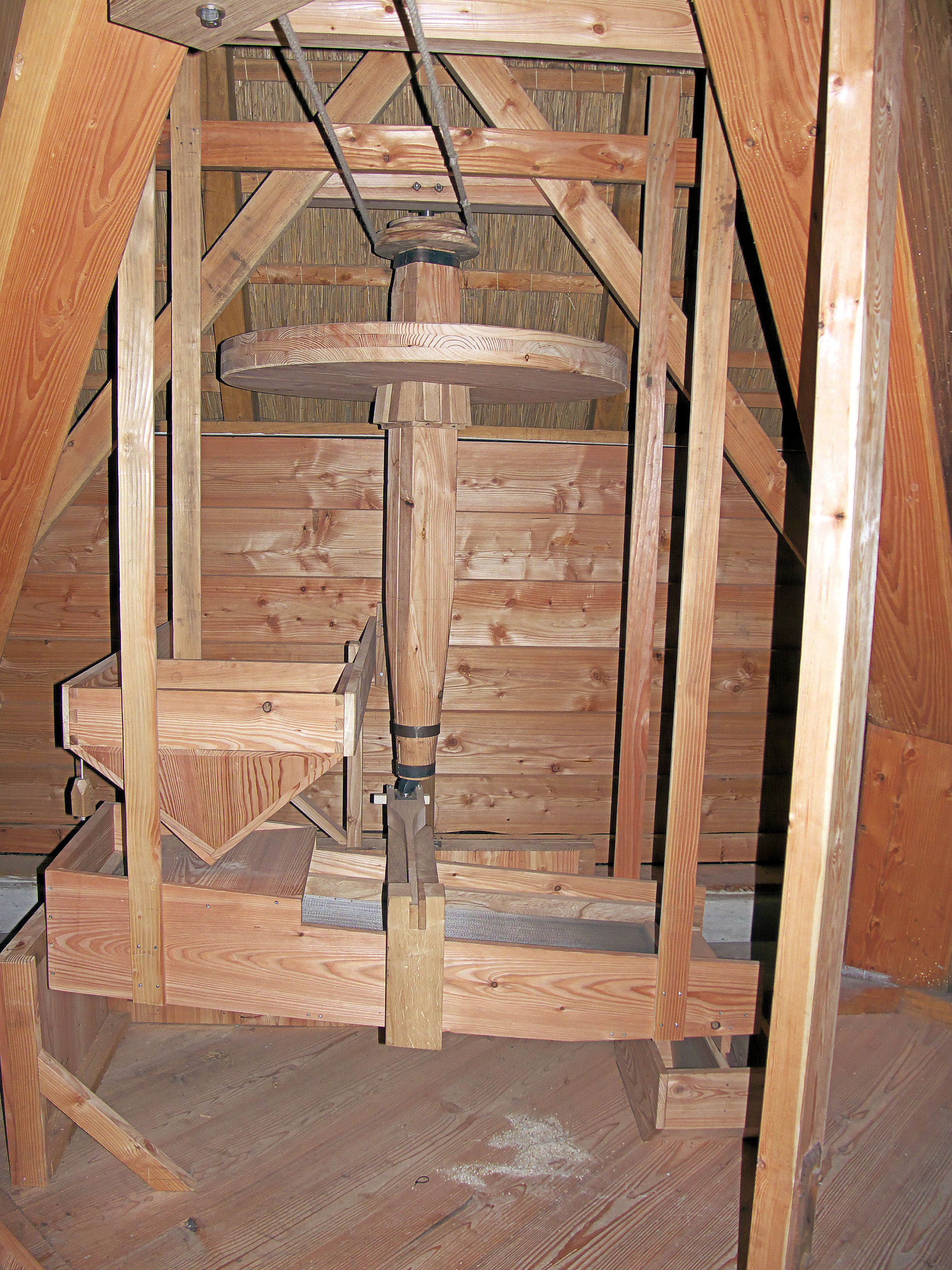 Molen De Koe Ermelo, aandrijving zifterij